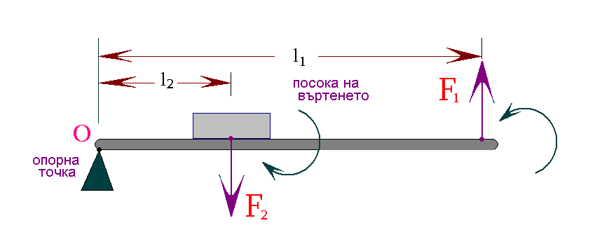 едностранен лост